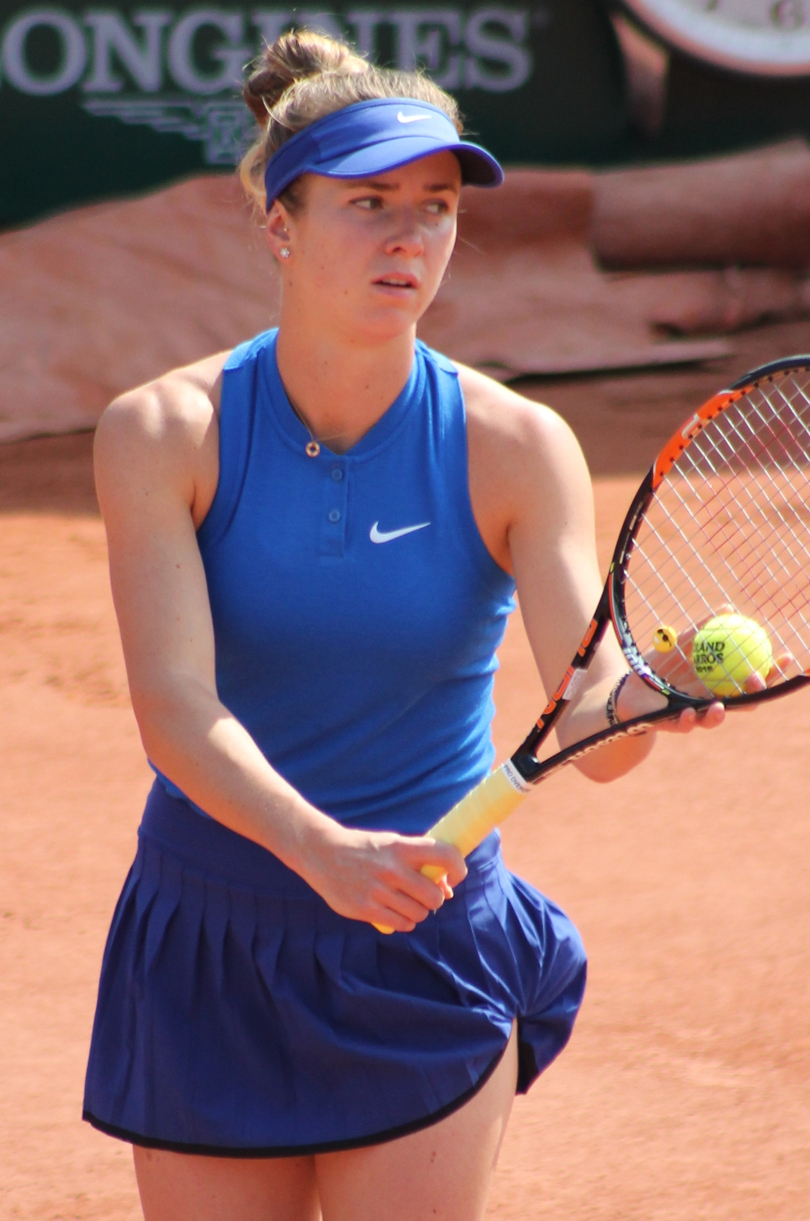 Svitolina RG16 (14)